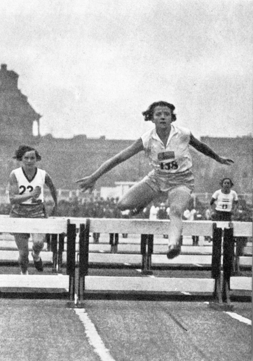 Women's World Games 1930 in Prague. The winner of hurdler 80 metres Maj Jacobsson Internationella kvinnospelen (Damolympiaden) 1930 i Prag. Vinnare av häck 80 meter: Maj Jacobsson.